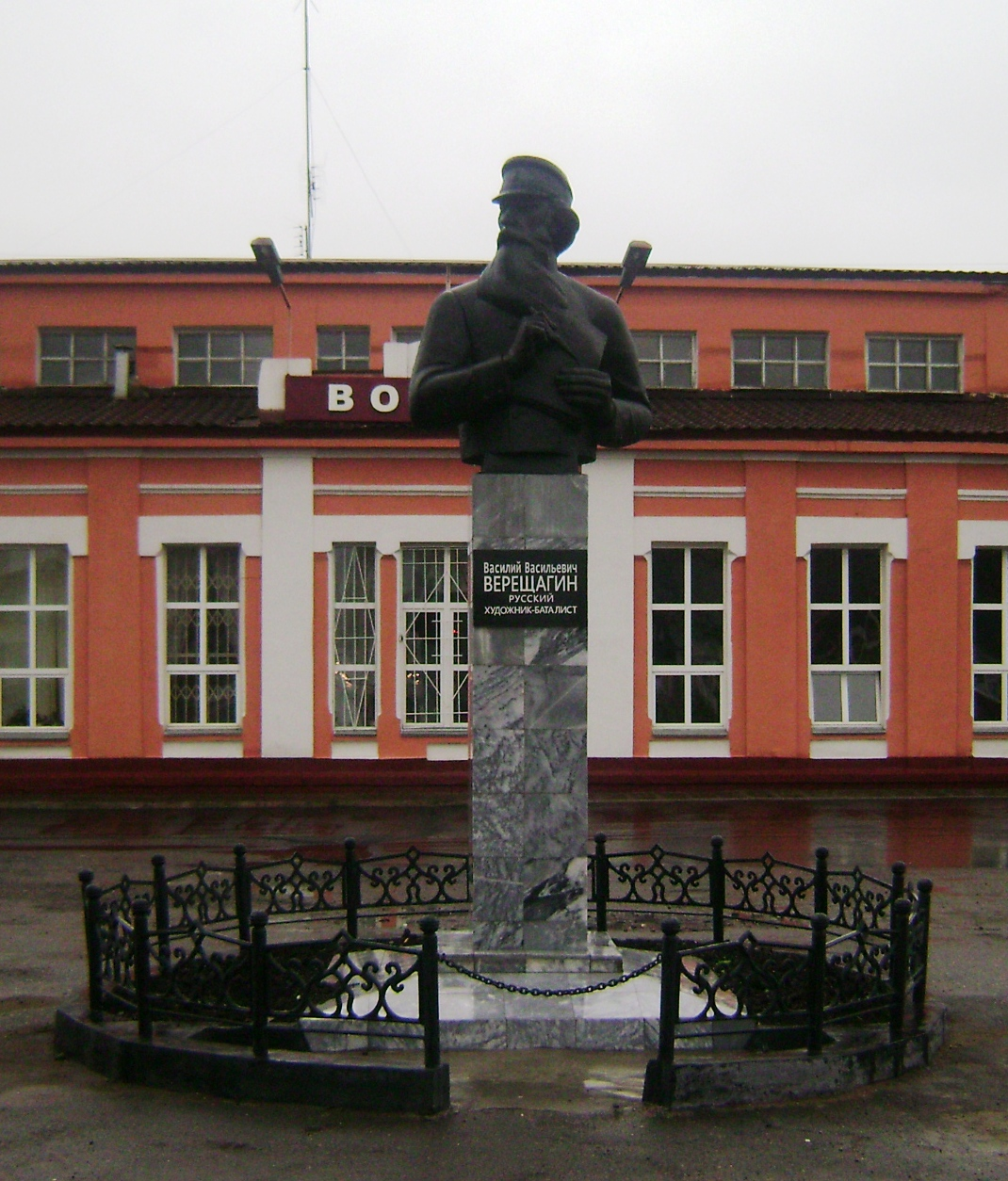 Бюст русского художника-баталиста В.В. Верещагина на станции Верещагино Свердловской ж/д